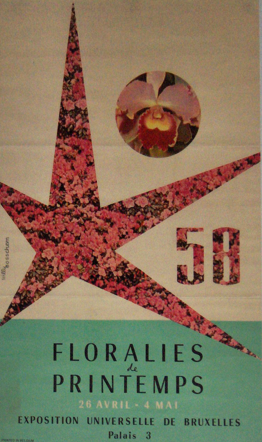 Affiche : Floralies de printemps, Expo 58, Brussel